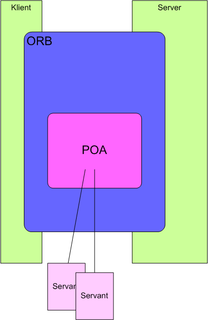 Das Diagramm zeigt die unterschiedlichen Schichten im Corba Kontext